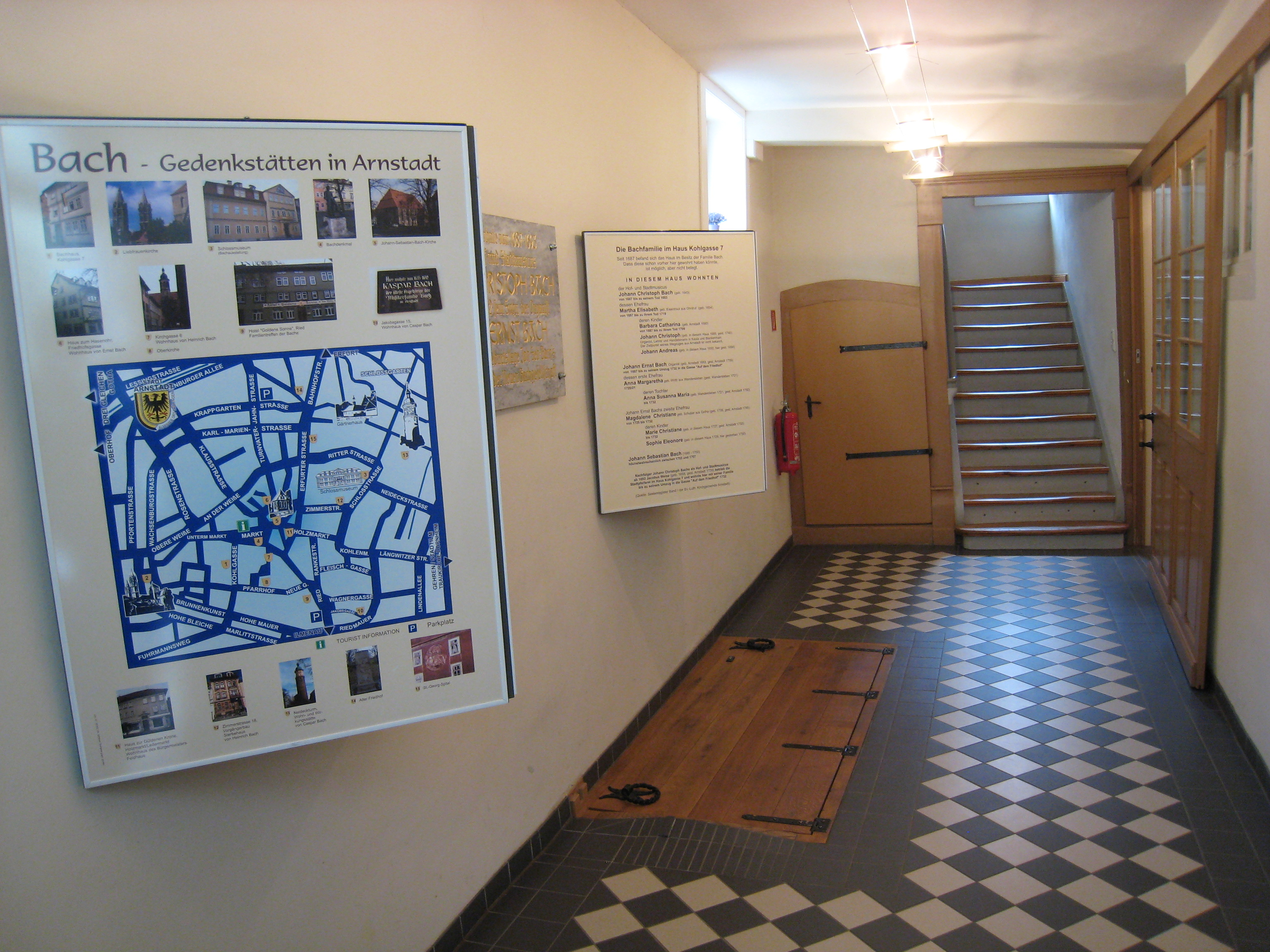 Eingangsbereich Bachhaus Arnstadt (Kohlgasse 7).